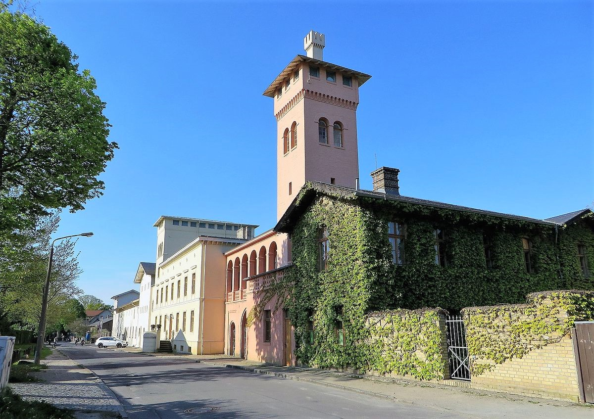 Blick von der Ribbeckstraße auf das Krongut Bornstedt in Potsdam.